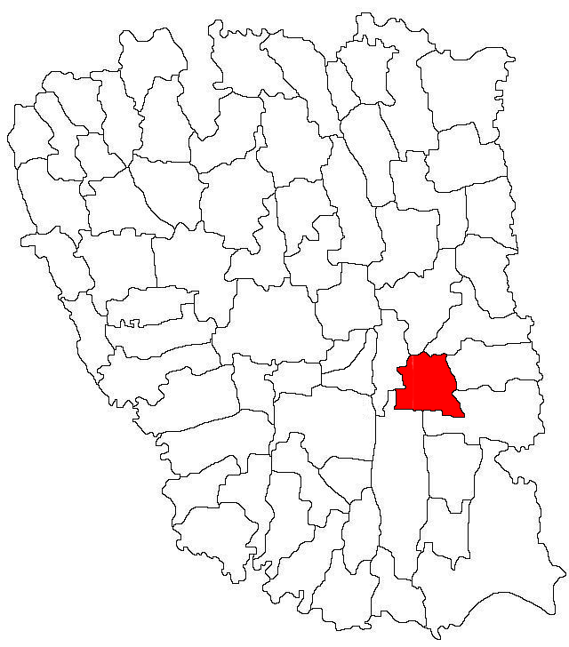 Categorie:Hărţi ale judeţului Galaţi